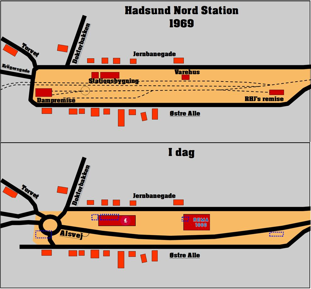 Kort over Hadsund Nord Station i 1969 og i 2020